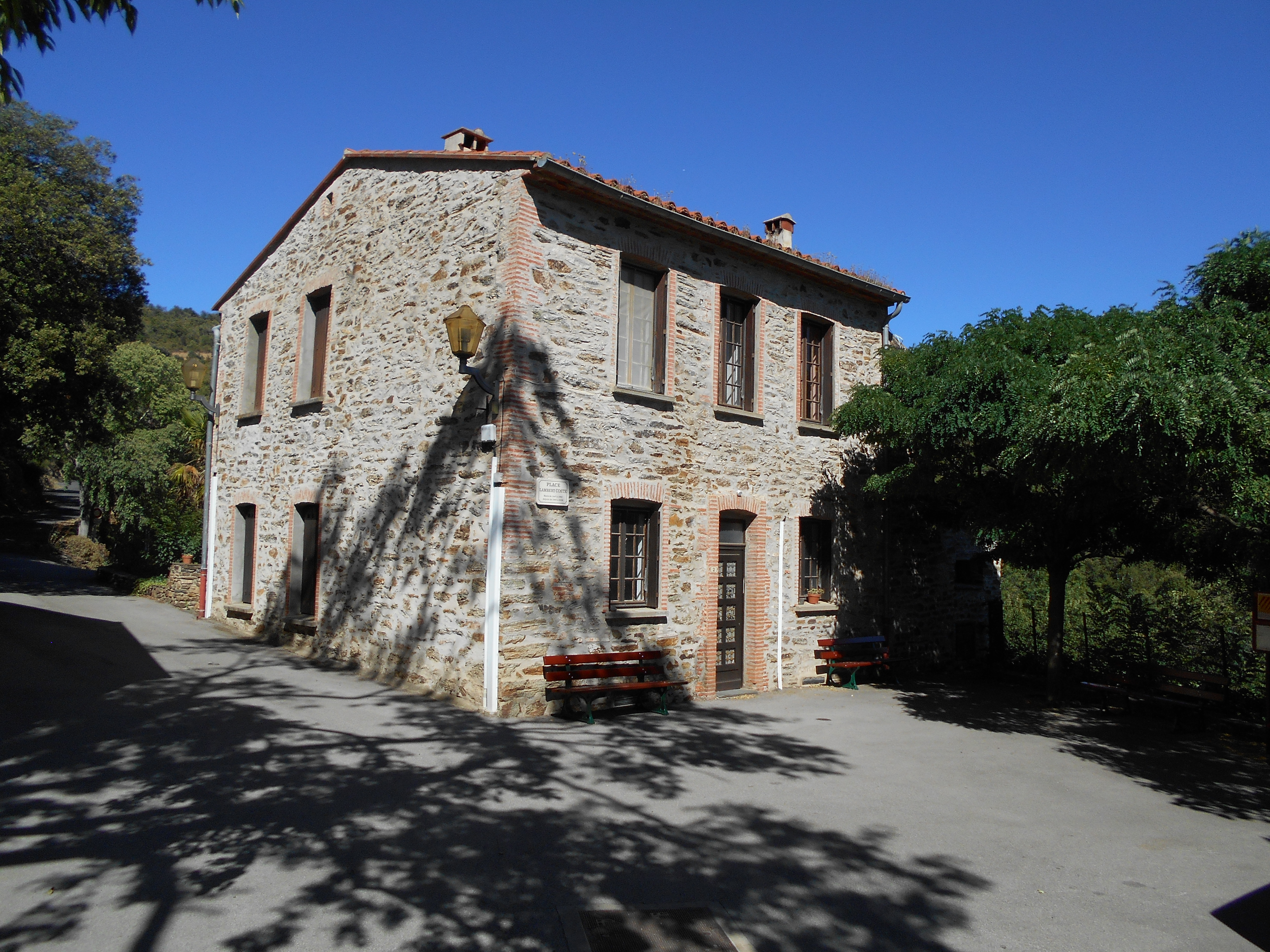 La Casa del Comú de Casafabre